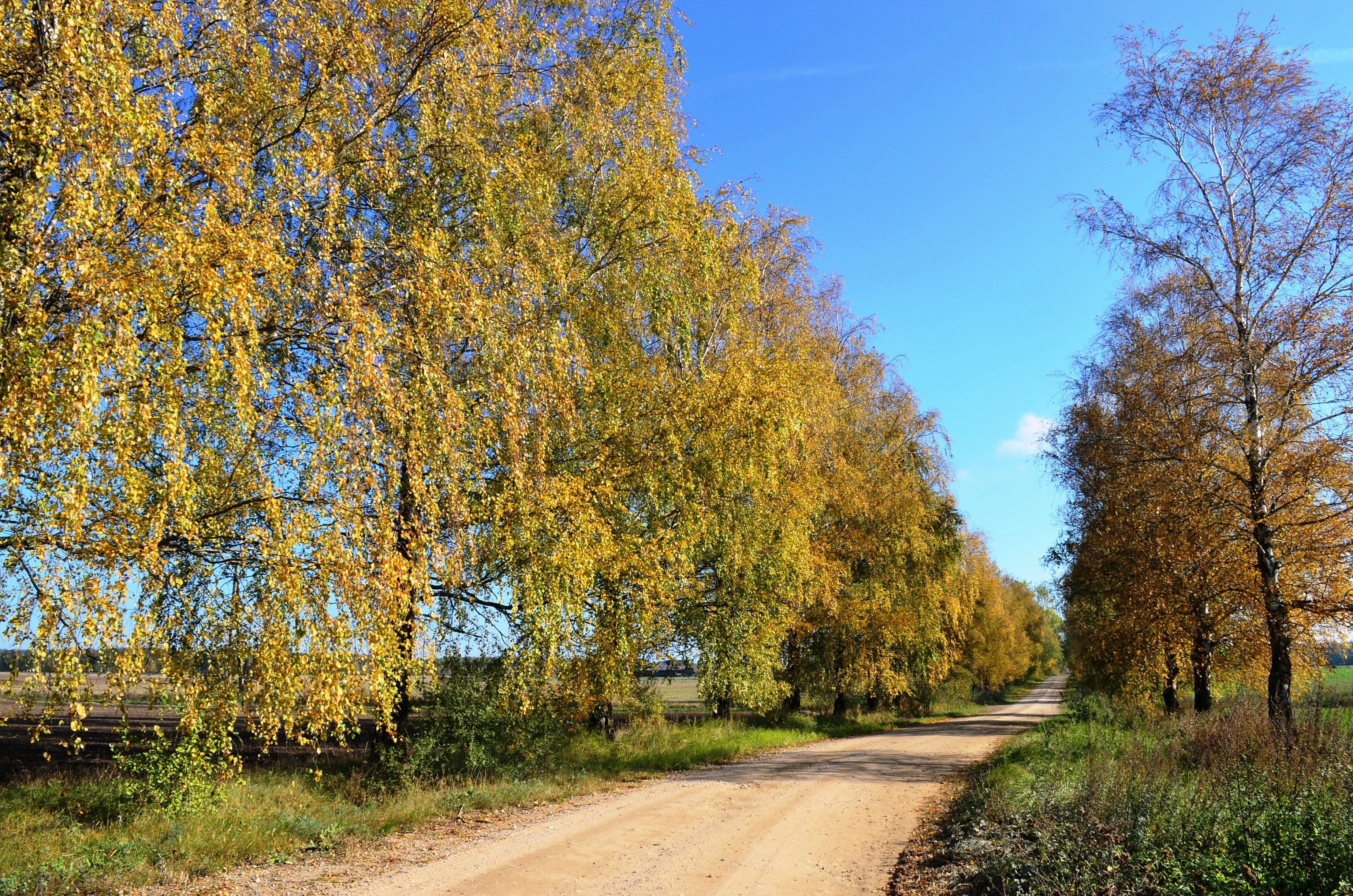 Beržais apsodintas kelias Zacišėn, Kėdainių raj.